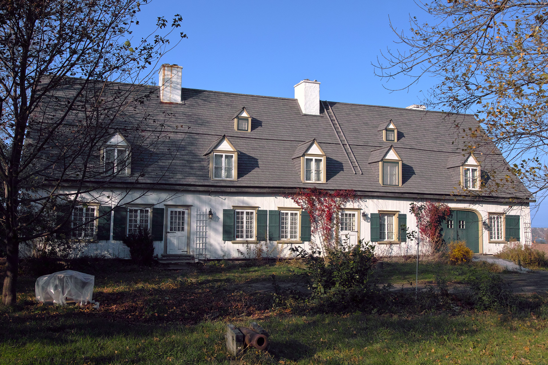 Maison Pâquet, 1630, route Marie-Victorin, Lévis (Canada). (Protection MH classé. Voir la liste des lieux patrimoniaux de la Chaudière-Appalaches pour plus de détails).